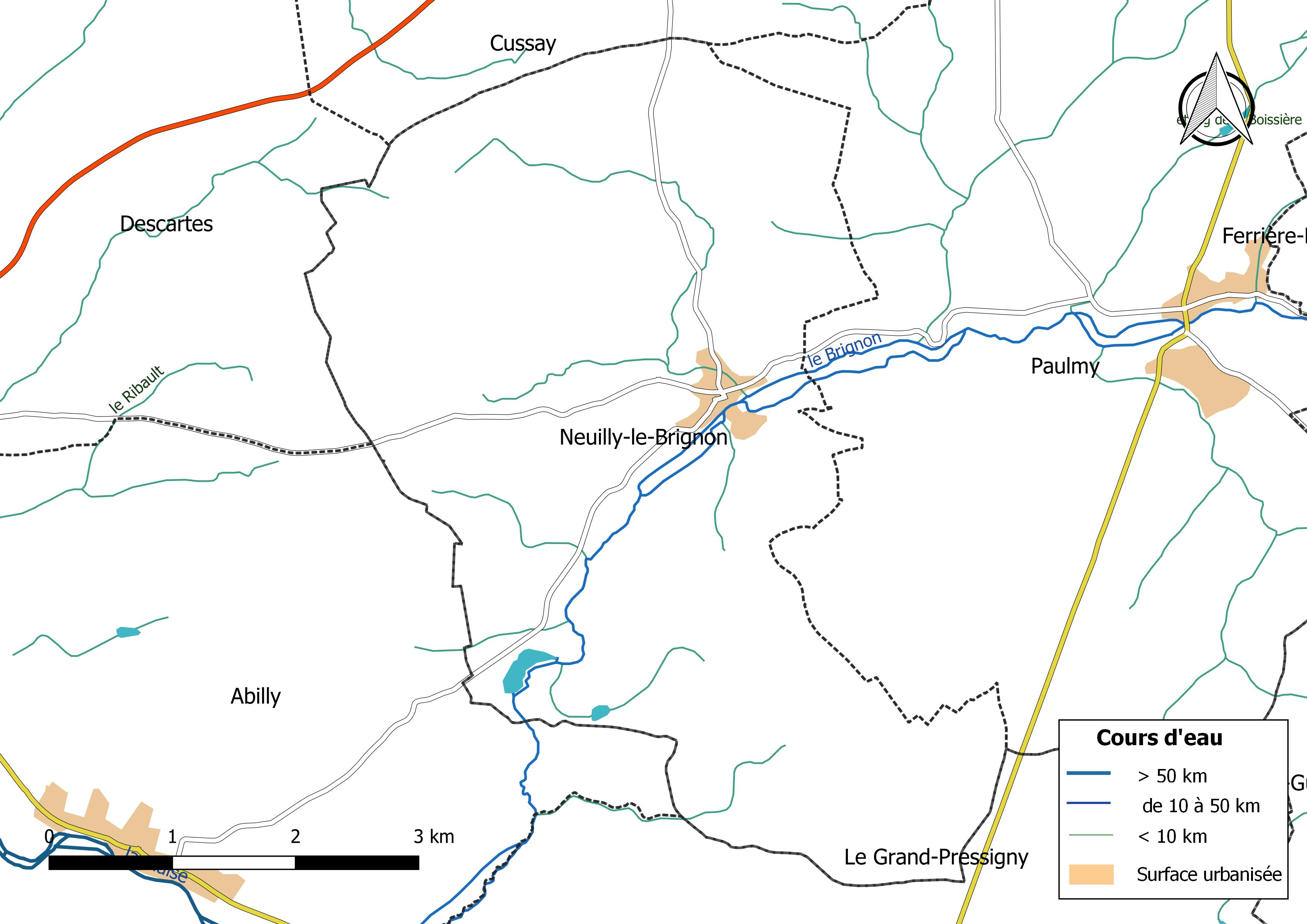 Carte du réseau hydrographique de la commune de Neuilly-le-Brignon (France).